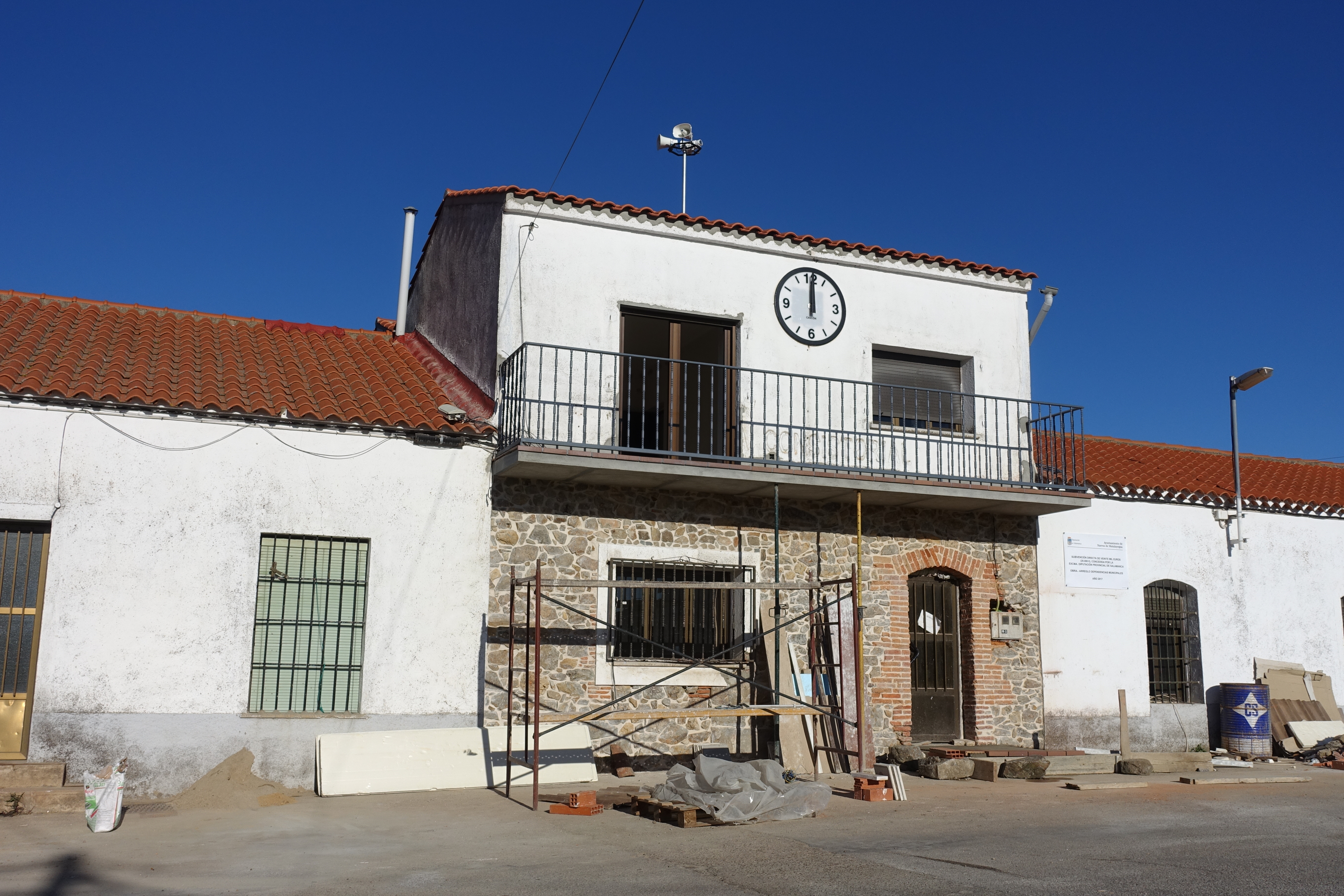 Casa consistorial de Narros de Matalayegua (Salamanca, España).